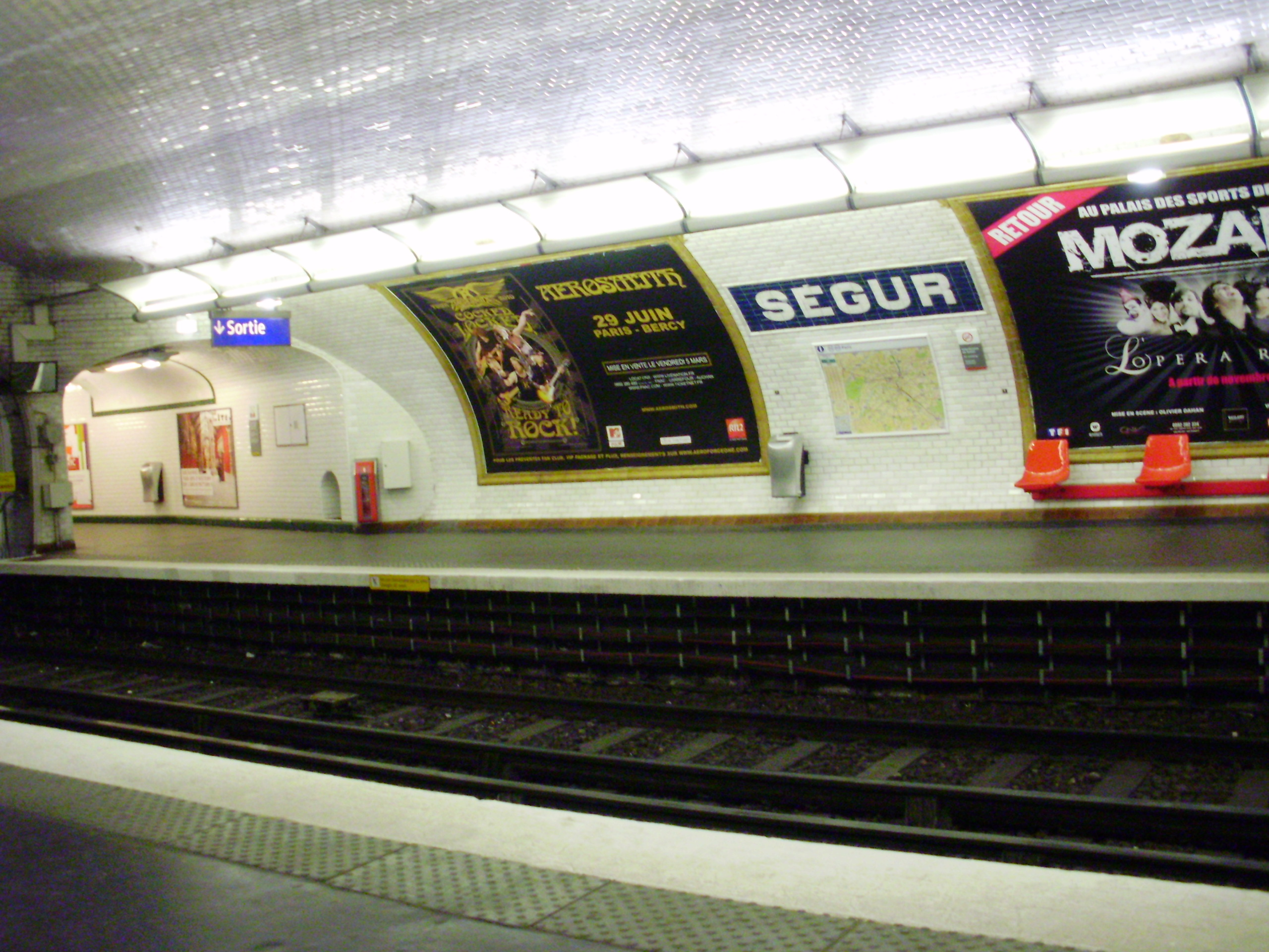 Quais de la station Ségur du métro de Paris